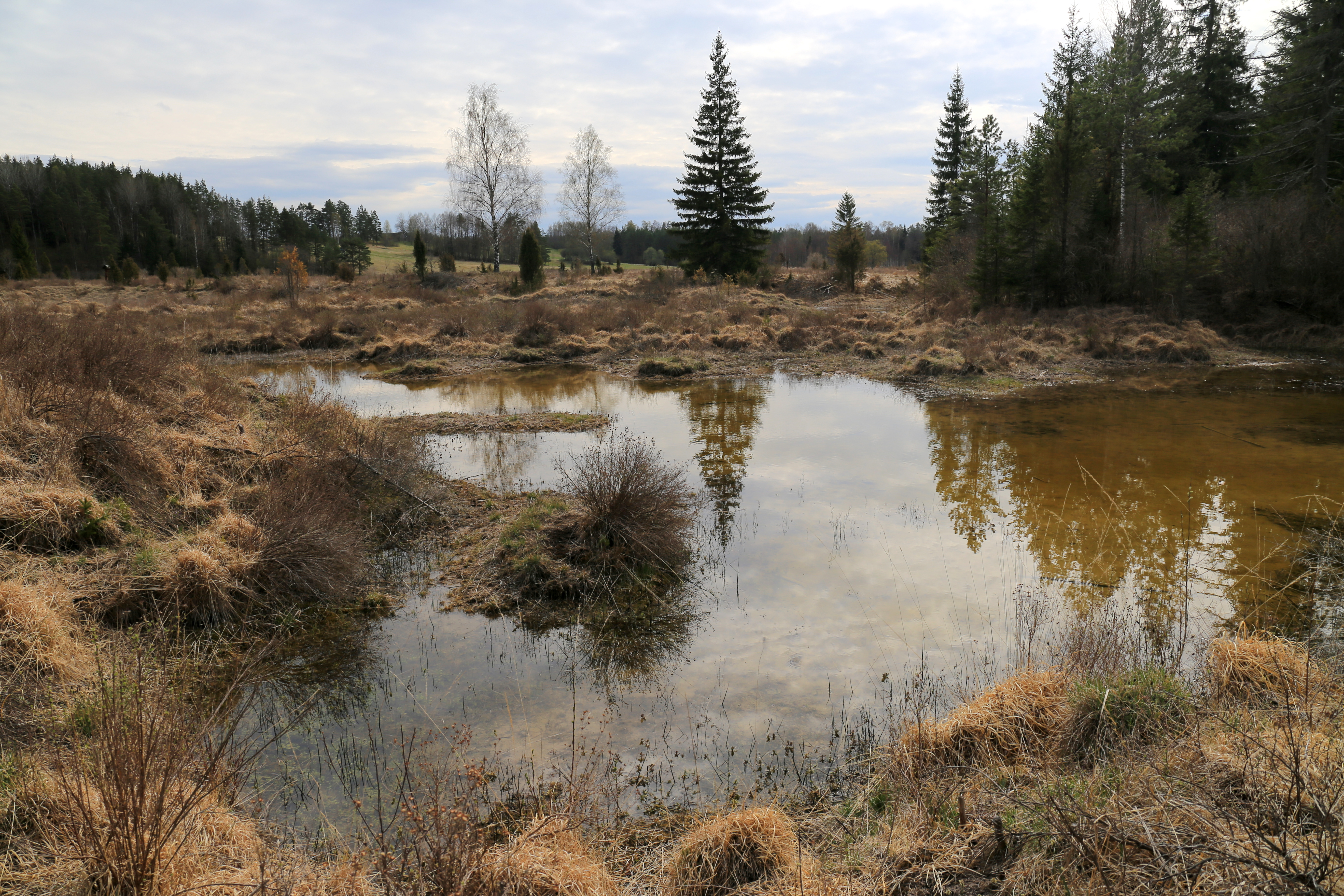 Čužu purvs / a bog